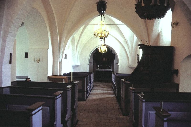 Everdrup Kirke i Danmark. Skibet set mod øst